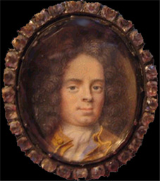 Carl Breitholtz till Margreteholm (165?-1717)